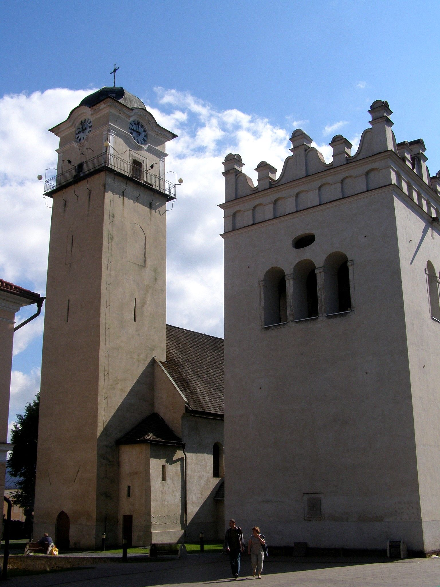 Poprad - pohľad na kostol sv. Egídia s renesančnou zvonicou